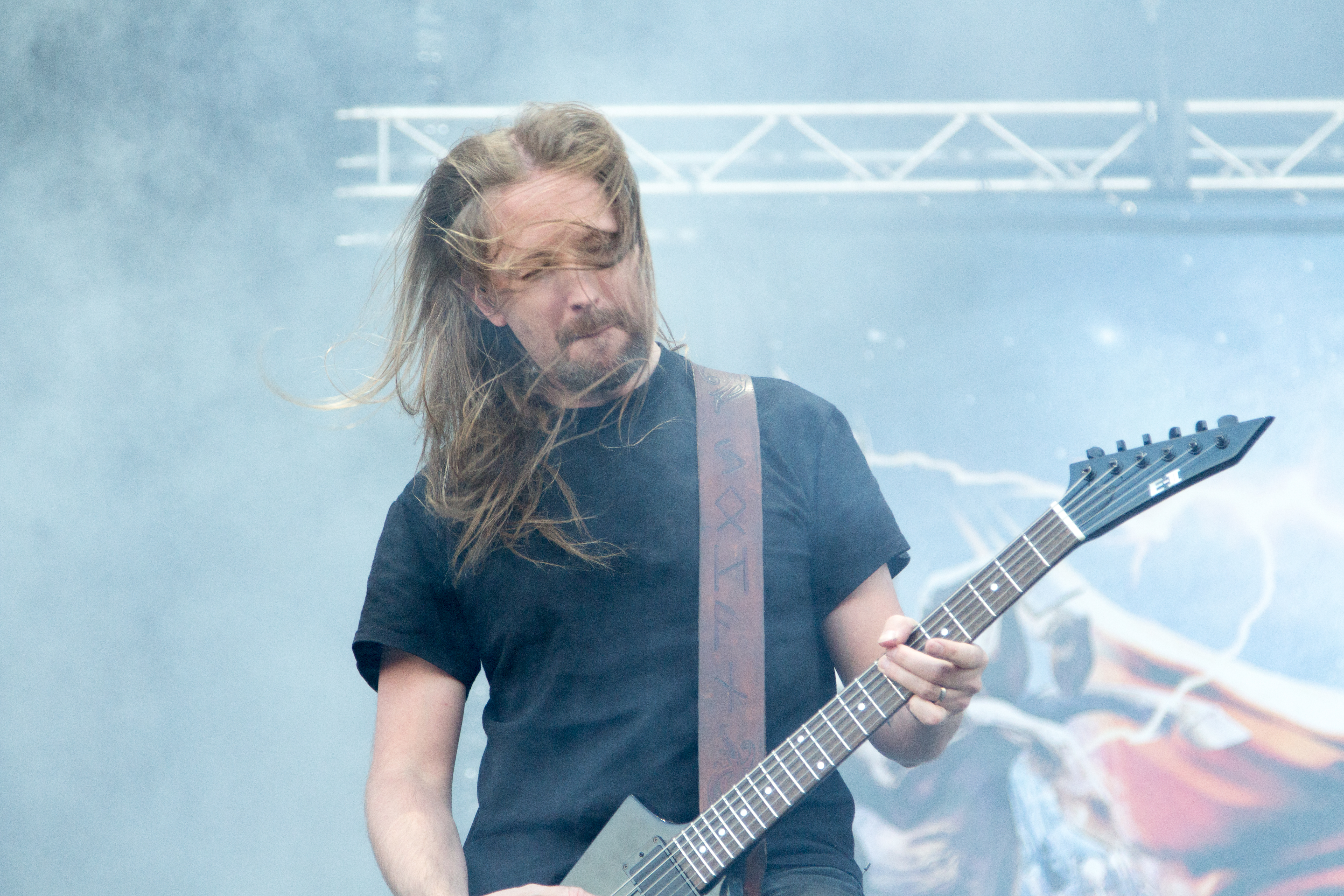 Johan Söderberg from Amon Amarth at Nova Rock 2014